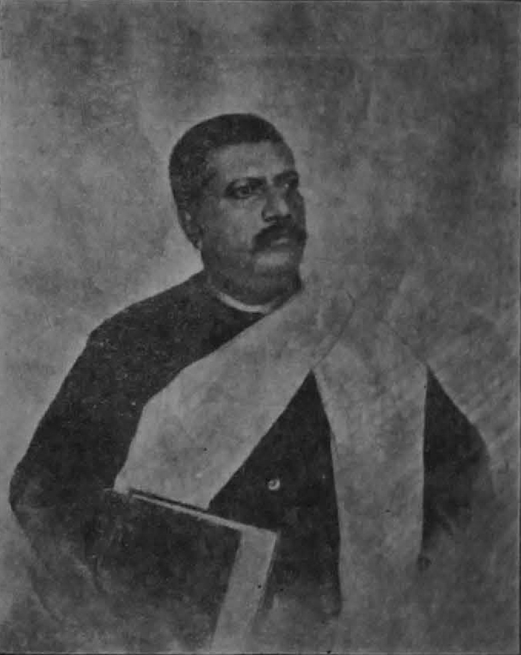 Bengal Celebrities